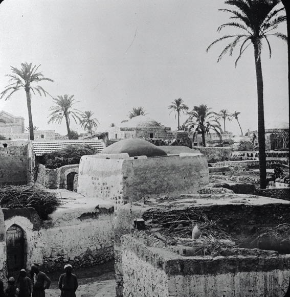 לוד - מראה